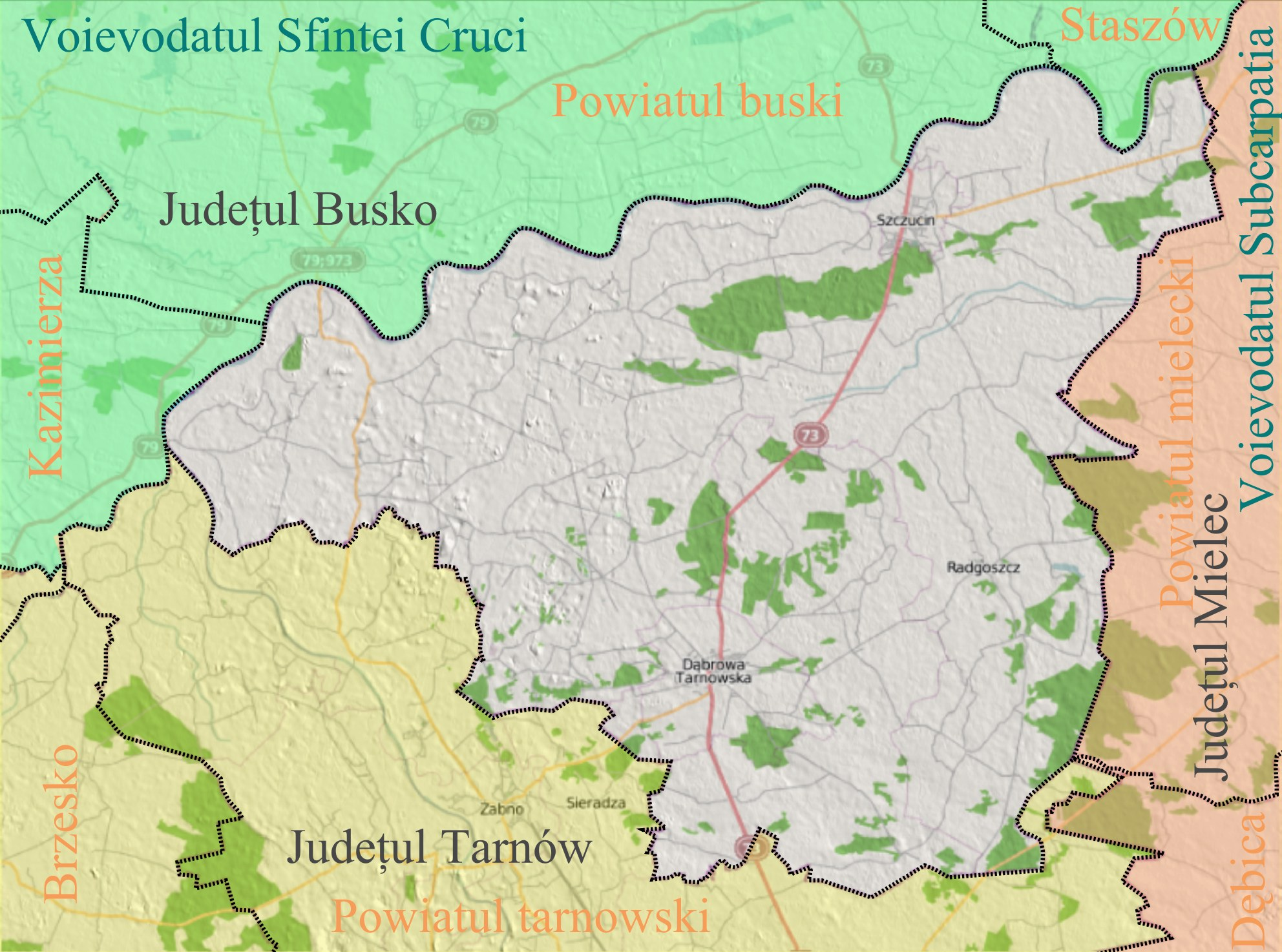 Harta de localizare a Judeţului Dąbrowa, Voievodatul Polonia Mică, Polonia. top = 50.375 bottom = 50.09 left = 20.65 right = 21.25